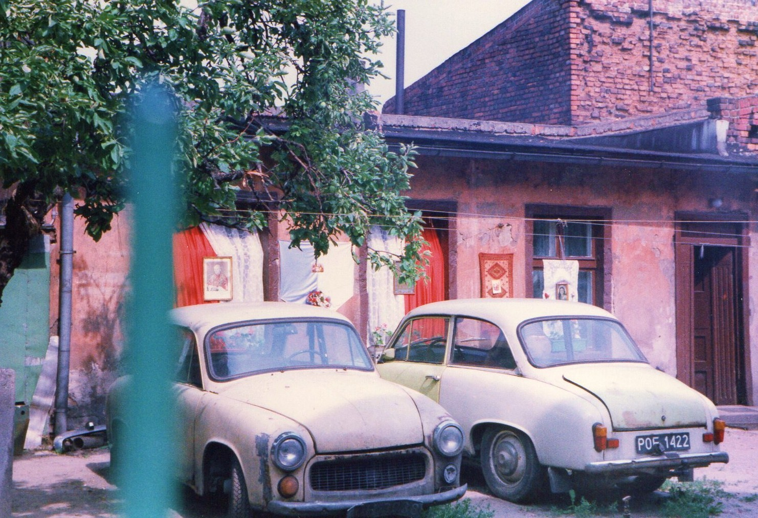 Boże Ciało na Głównej w Poznaniu - 10.6.1993r.